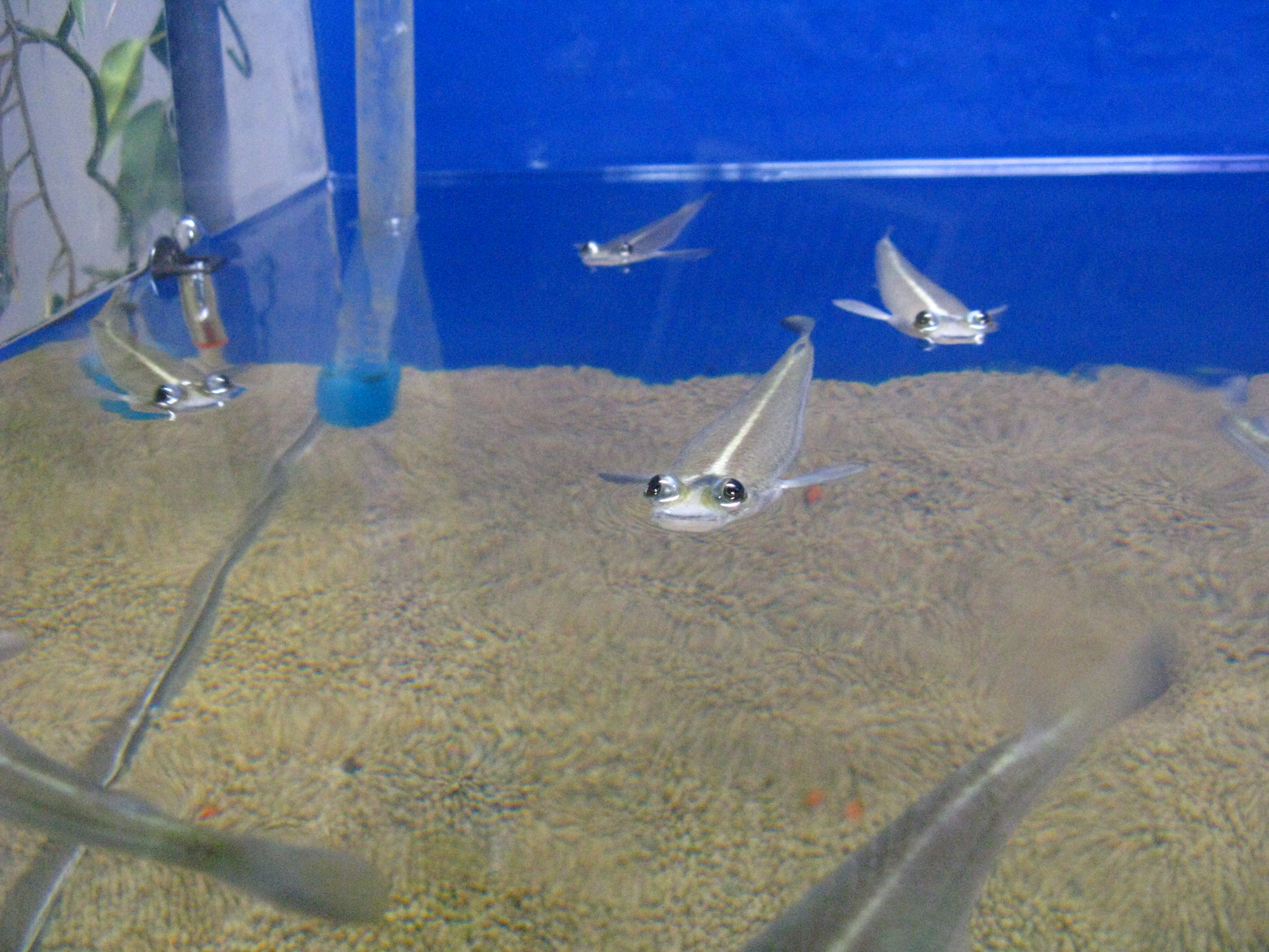 Scientific name Anableps anableps